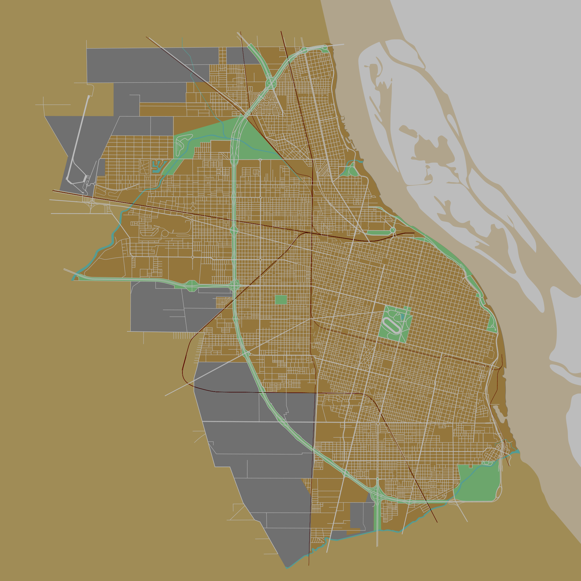 Mancha urbana de Rosario, atravesada por autopistas, arterias, calles y vías férreas. En el lado superior derecho se ven las islas del río Paraná, en color celeste grisáceo.